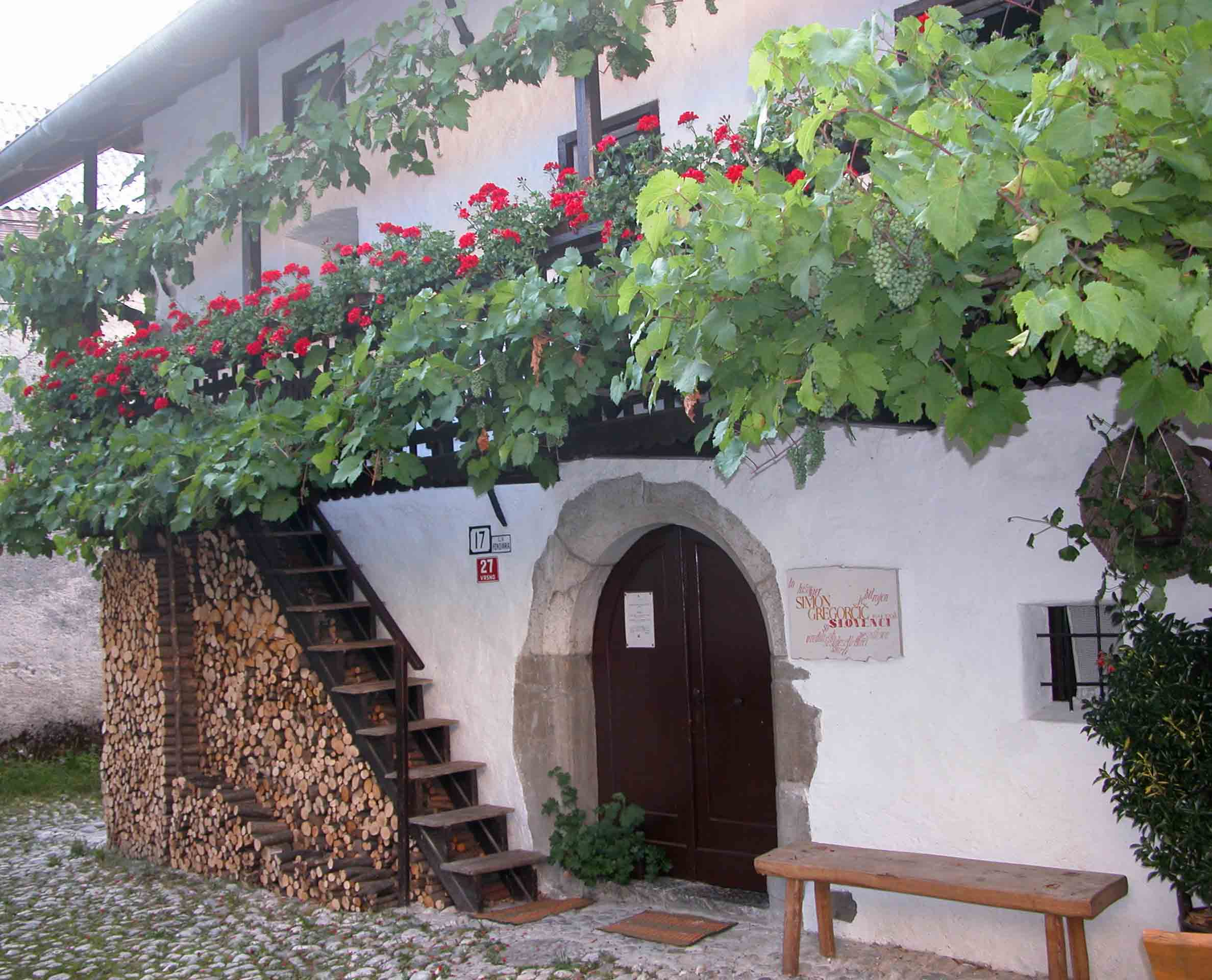 Birth house of Simon Gregorčič, slovenian poet (Vrsno, Slovenia) photo:Ziga 10:40, 16 April 2007 (UTC)